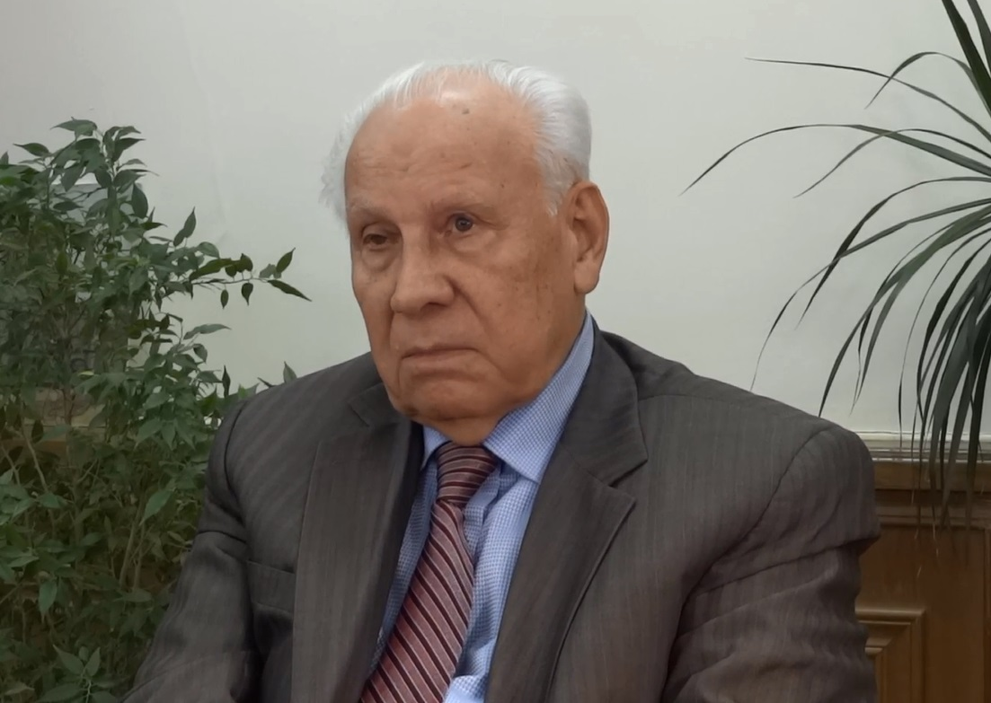 Фото Анатолия Ивановича Лукьянова.